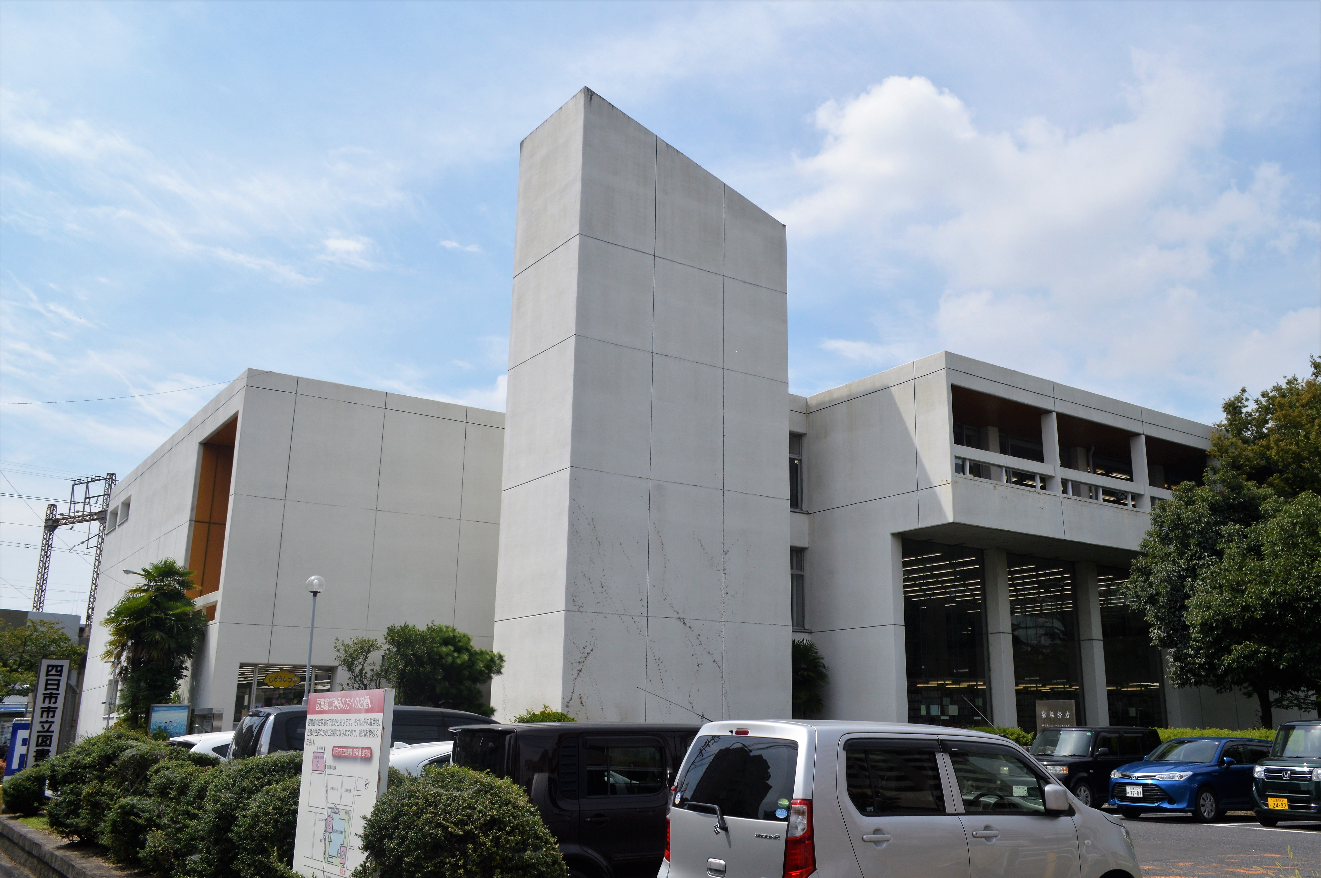 三重県四日市市の四日市市立図書館。